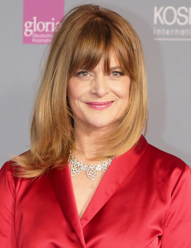 Настасія Кінскі на "Gloria – Deutscher Kosmetikpreis" 31 березня 2017 року в Hilton Hotel у Дюссельдорфі.